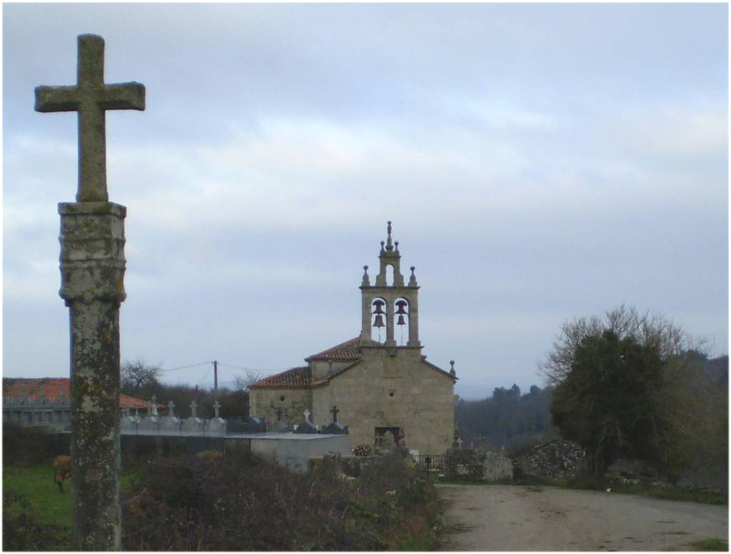 Igrexa parroquial de Facha (Antas de Ulla)